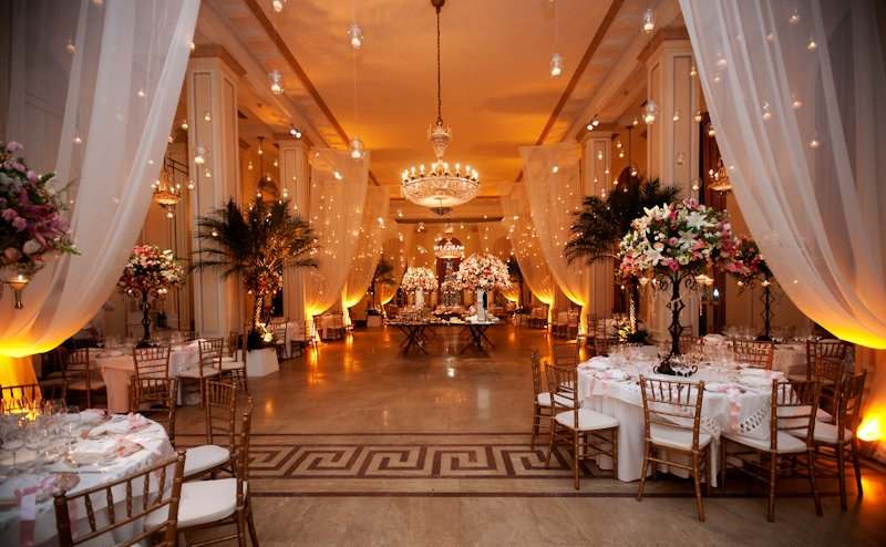 Copacabana Palace - Noble Room